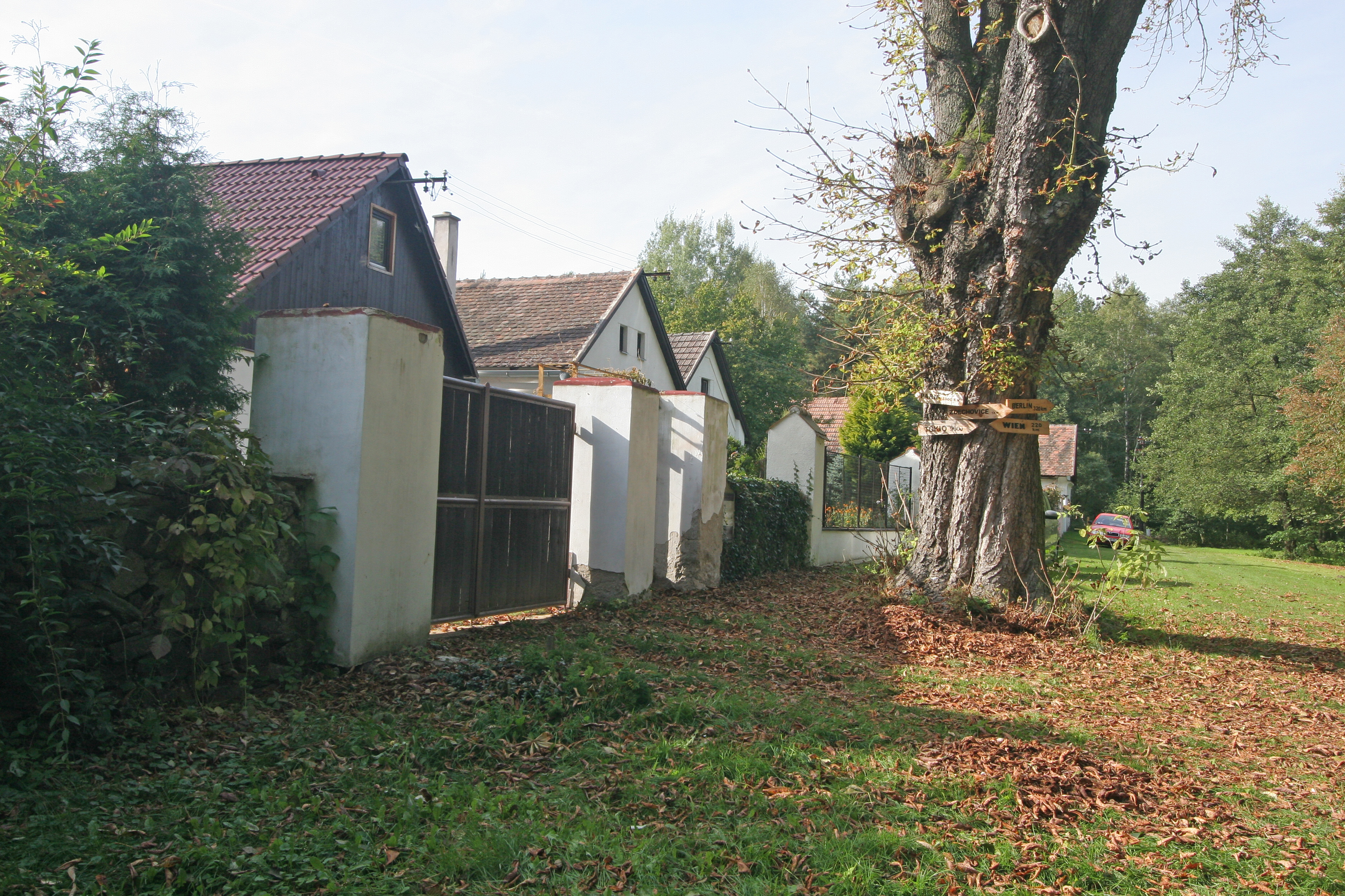 Zbraněves čp. 154